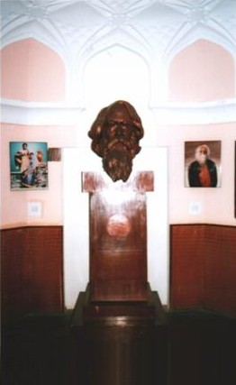 Cropped version of User:Rama's Arrow's image :Image:Tagorestatue (Small).jpg. Source: [1] Image credit Photo taken by Rama's Arrow.